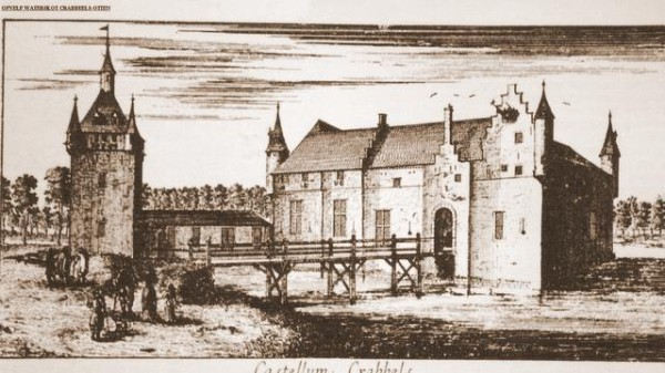 Slot Opvelp.